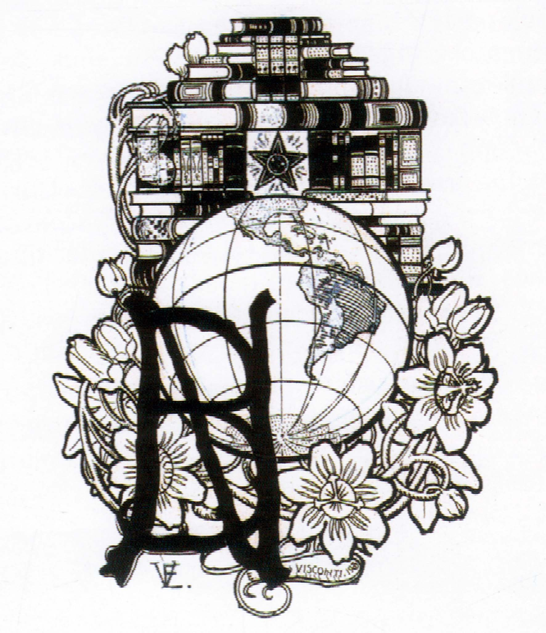 Emblema clássico, antigo, da Biblioteca Nacional do Brasil feito em 1903 por Eliseu Visconti, em nanquim e guache sobre papel com tamanho de 27 20 cm.